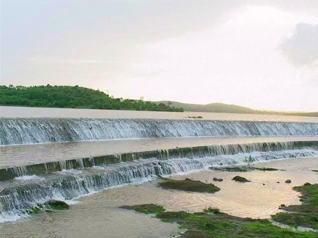 bendsura project at Beed